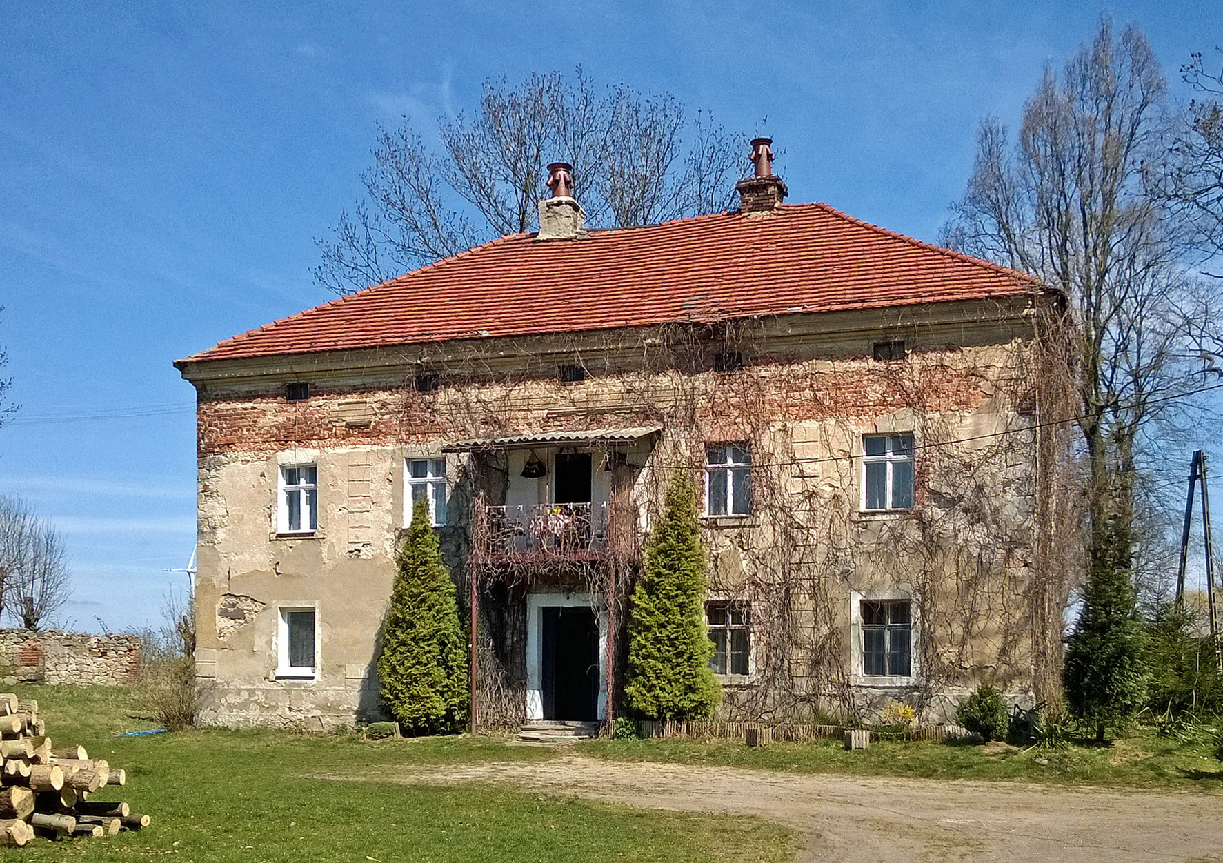 Herrenhaus in Stangenhain (Pokrzywnik)